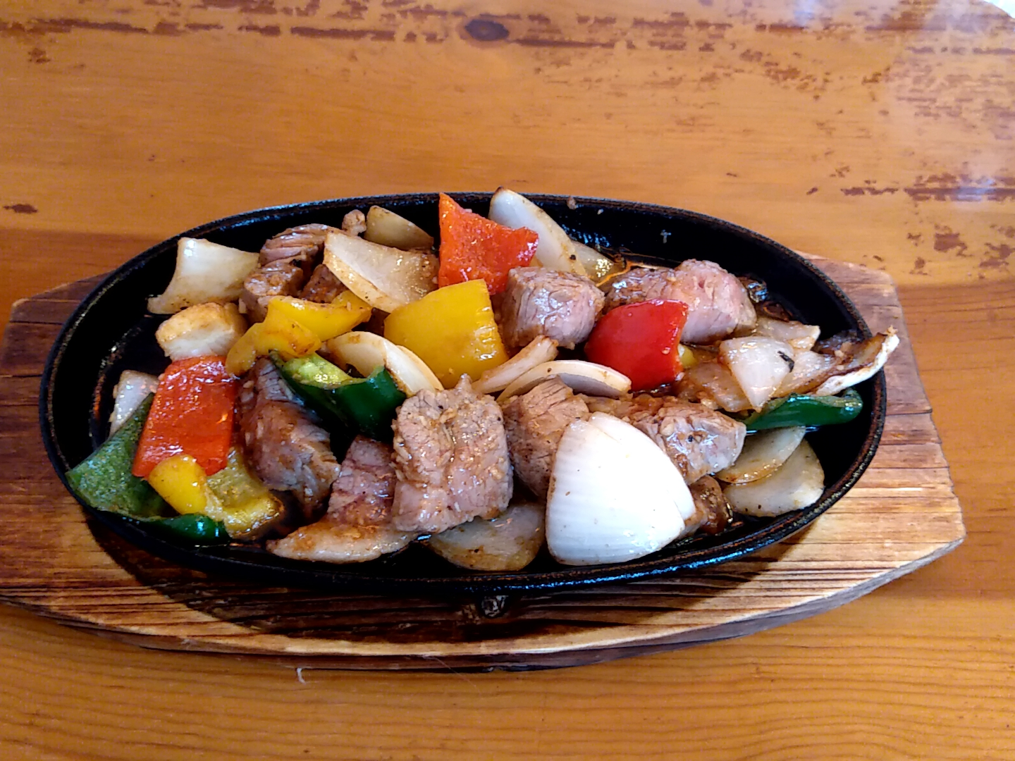 SADO（沖縄県うるま市）のチャップステーキ